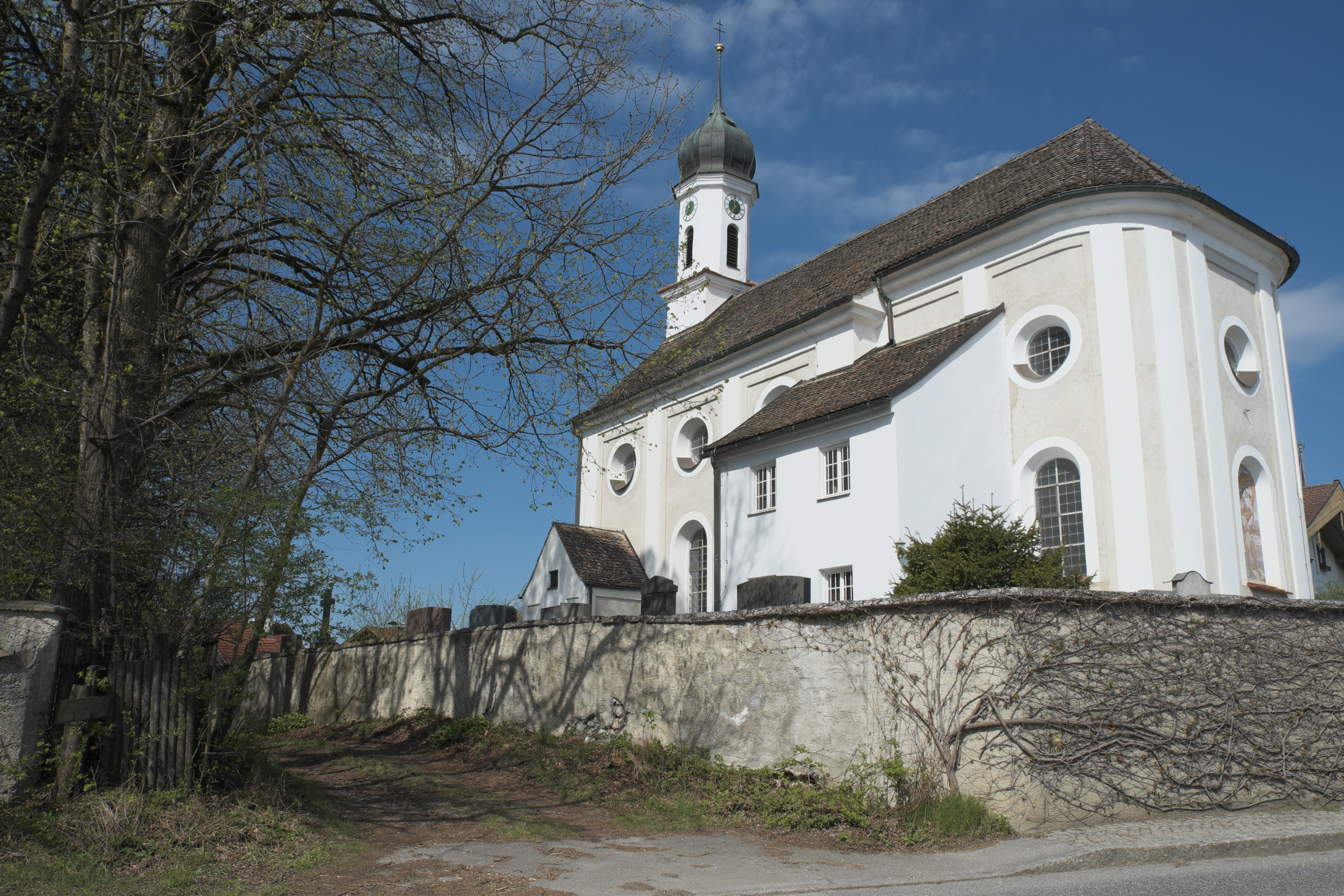 Katholische Pfarrkirche St. Margaretha in Magnetsried (Seeshaupt) im Landkreis Weilheim-Schongau (Bayern/Deutschland)